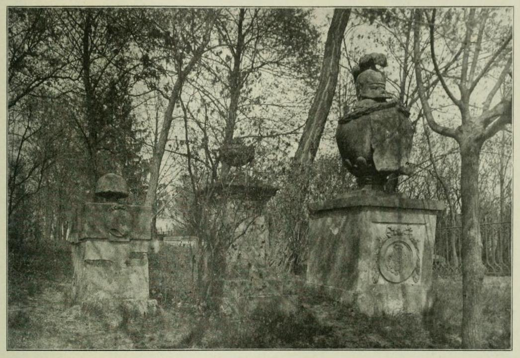 Grab des Generals Paul von Natalis (1722-1789) (rechts) und seiner Frau Rahel von Natalis geb. von Collas (1721-1795), mittleres Denkmal unbekannt, Grabmale auf dem Bergfriedhof